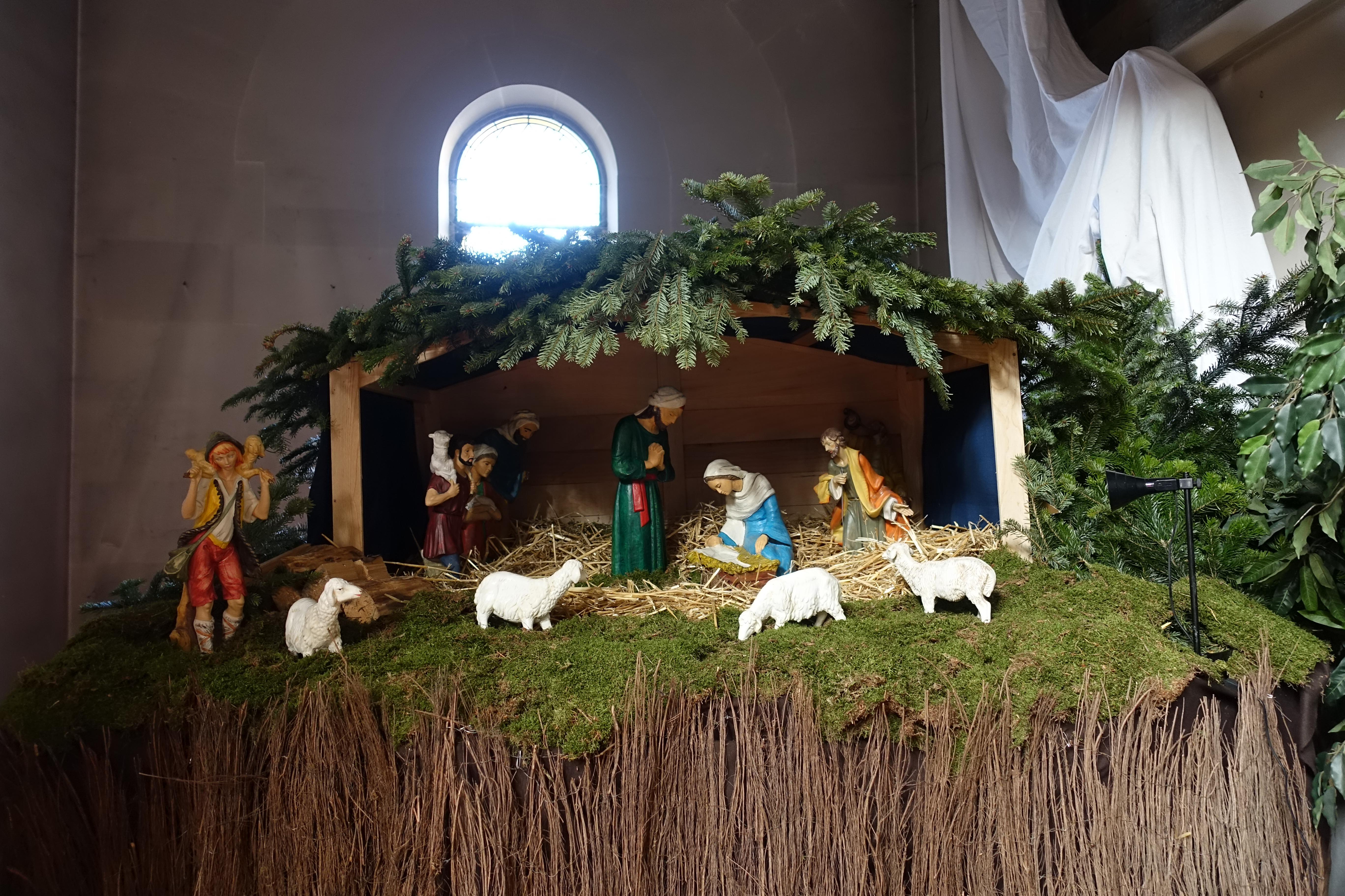 Nativity scene @ Notre Dame du Travail @ Paris Église Notre-Dame-du-Travail, 36 Rue Guilleminot, 75014 Paris, France.